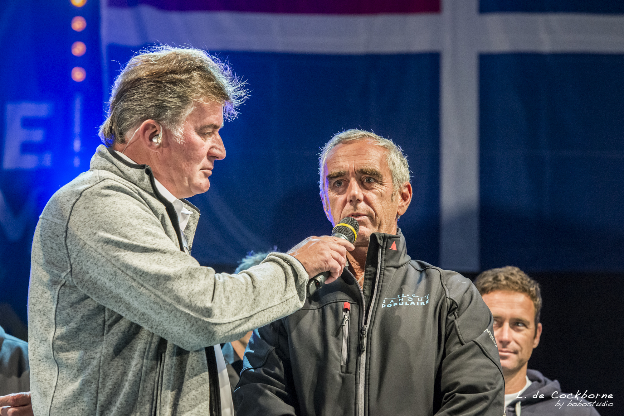 route_du_rhum_2014-242